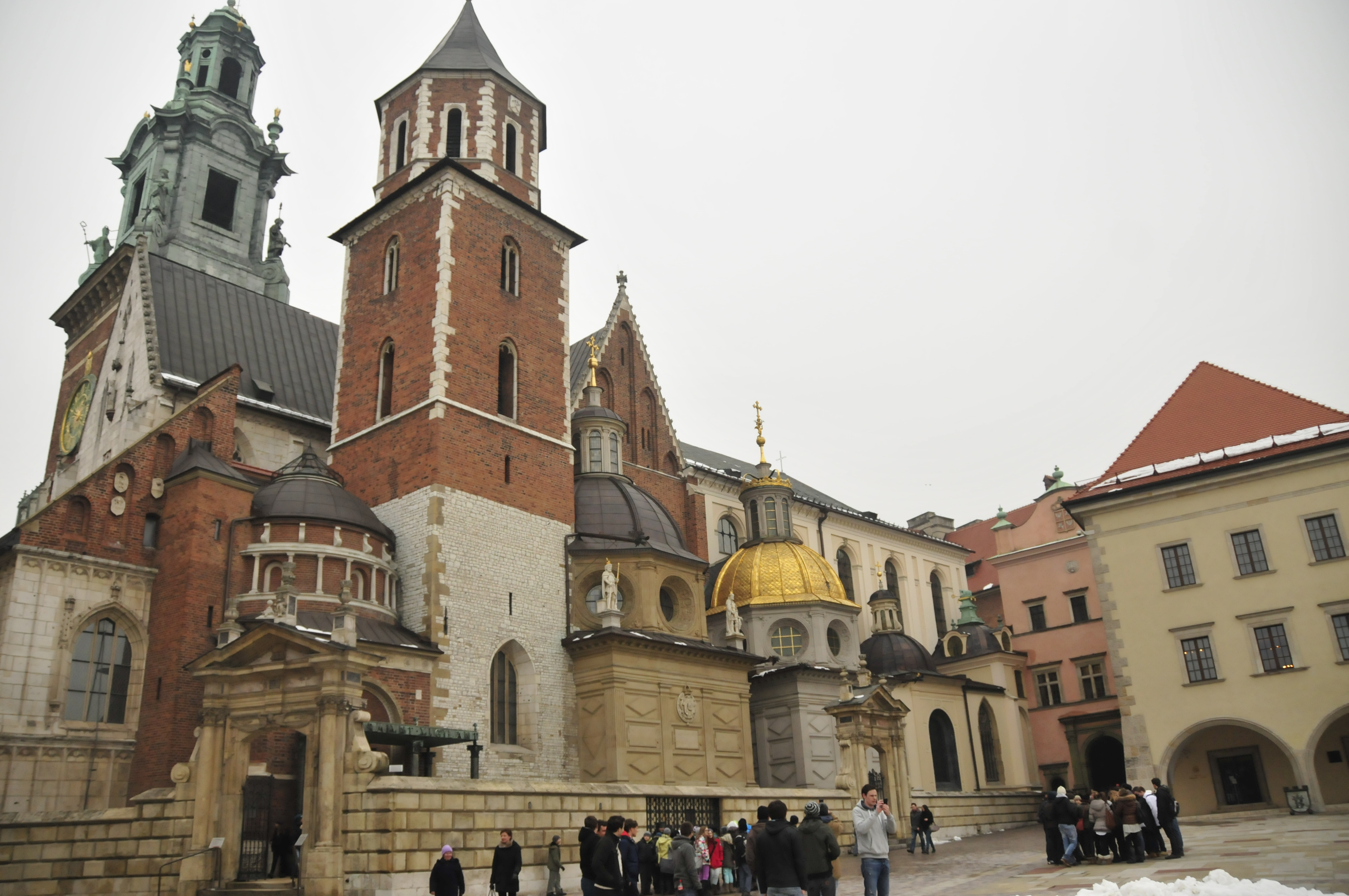 Wawel Cathedral/katedra wawelska